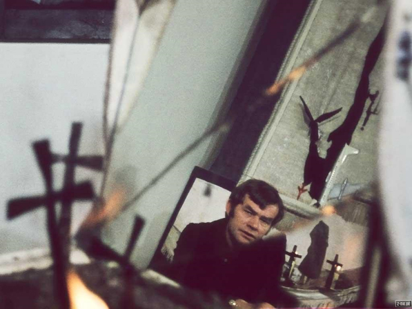 Władysław Hasior, slajd z serii "Portret imaginacyjny" (fot. arch. Muzeum Tatrzańskiego)